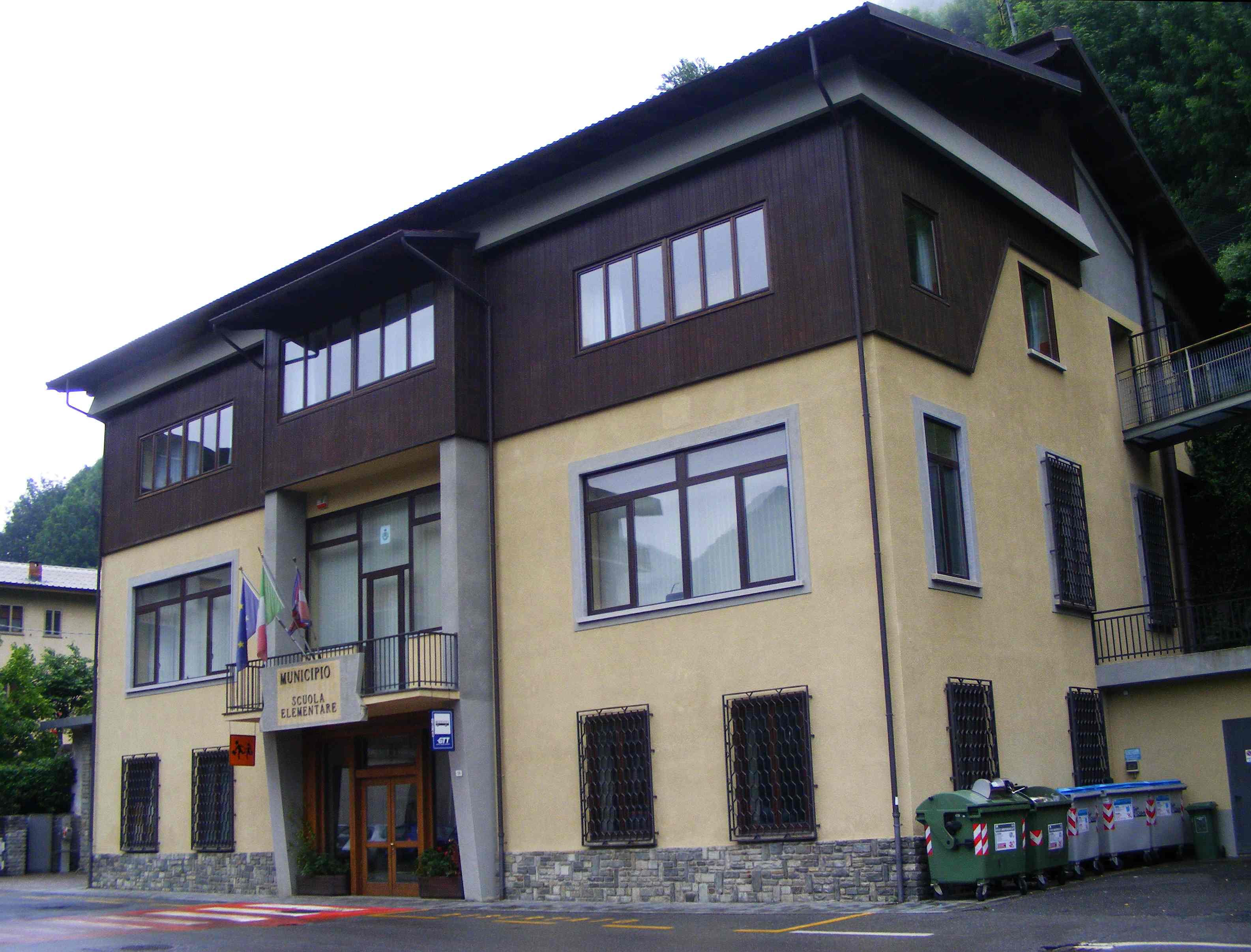 Pessinetto (TO): il municipio Эрзянь: Pessinetto (TO, Italy): town hall